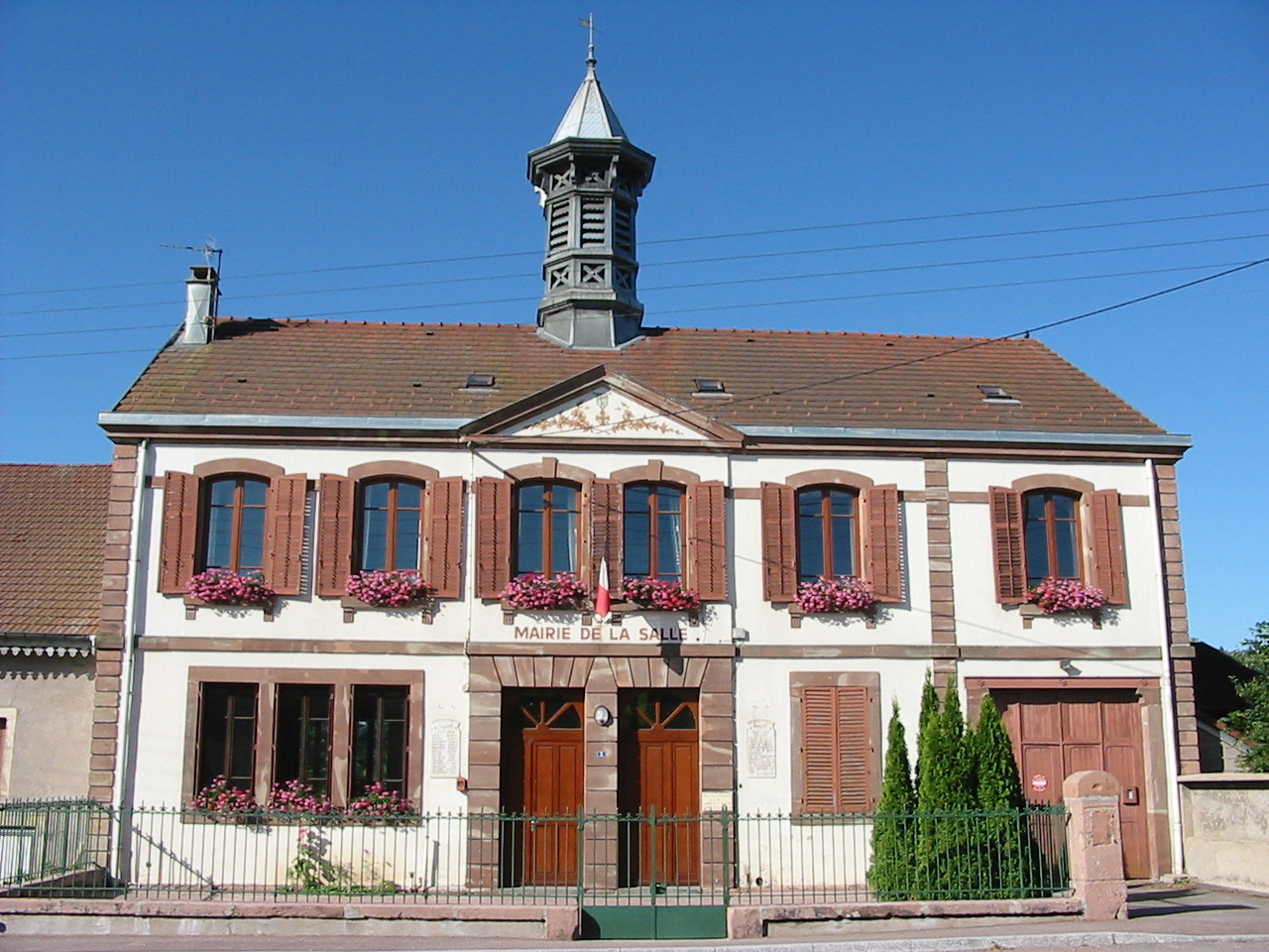 Mairie de la Salle, commune du département des Vosges.